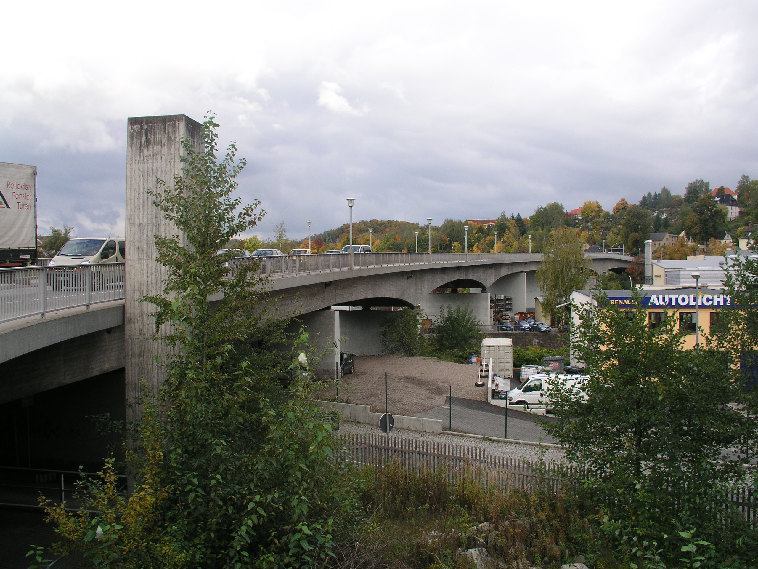 Bahnhofsbrücke, Gesamtansicht (1)